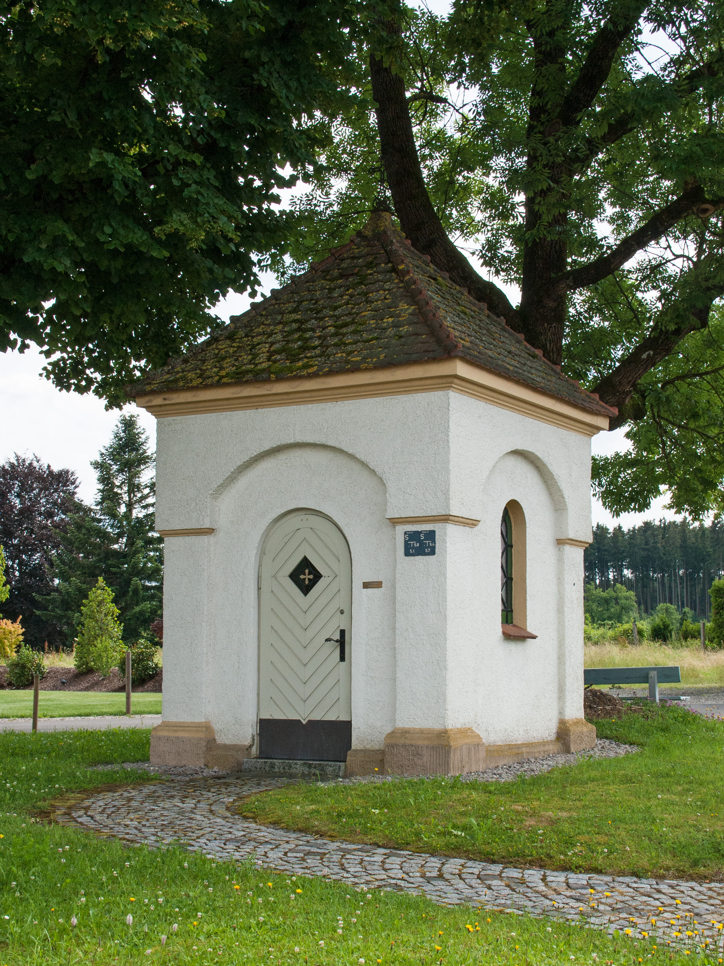 Ansicht von Osten